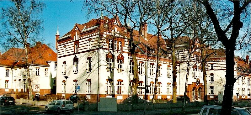 ehem. Kaserne des II. Batls. des Infarterie-Regiments "Lübeck" (3. Hanseatisches) Nr. 162, im 3. Reich als Meesen-Kaserne benannt.